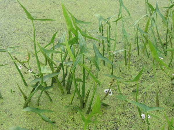 Pijlkruid